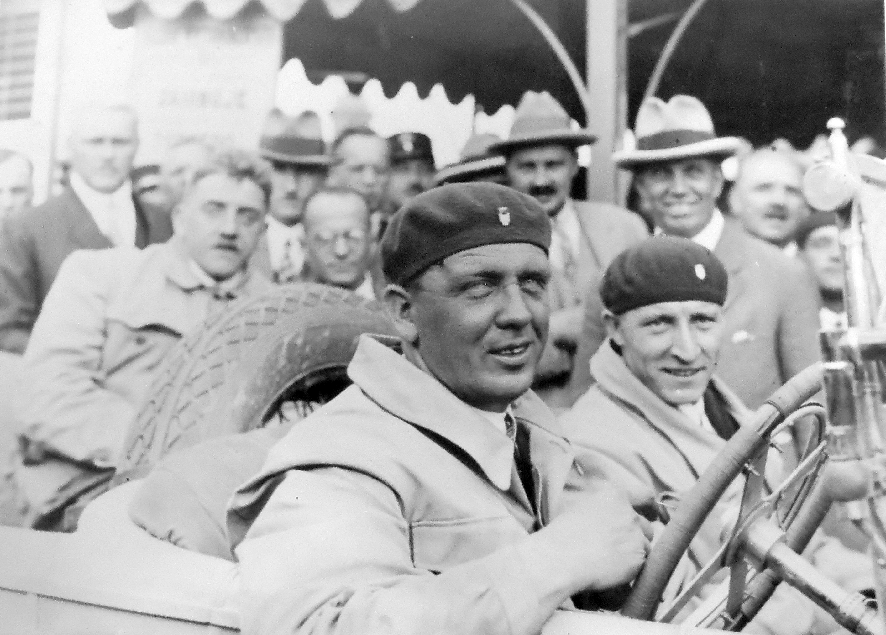 Walter typu P (1927), Knapp s Vojířem v cíli jízdy 10000 km